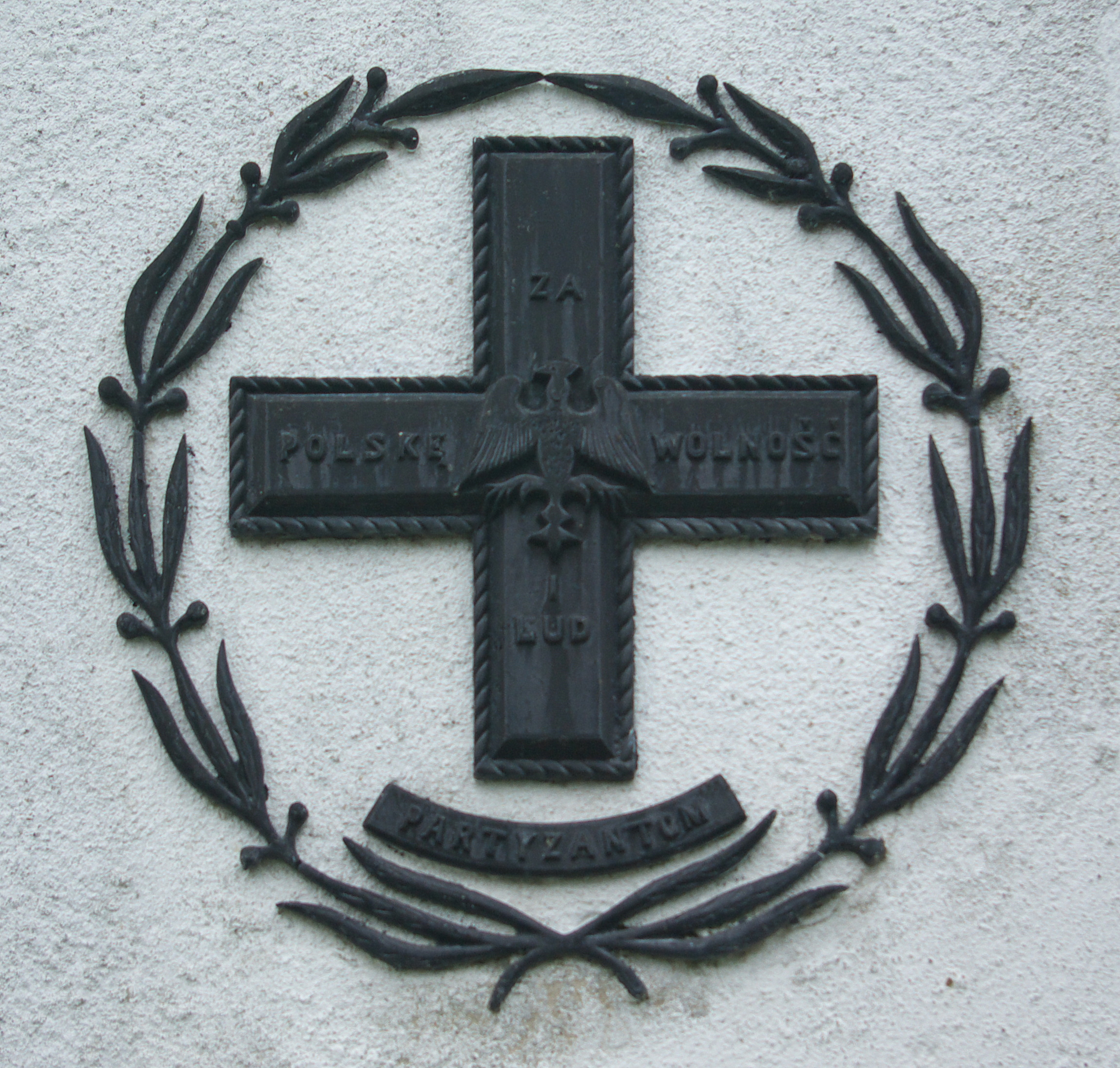 Pomnik rozstrzelanych przez Niemców 20 marca 1944 roku 10 osób w Falejówce. Emblemat Krzyża Partyzanckiego.